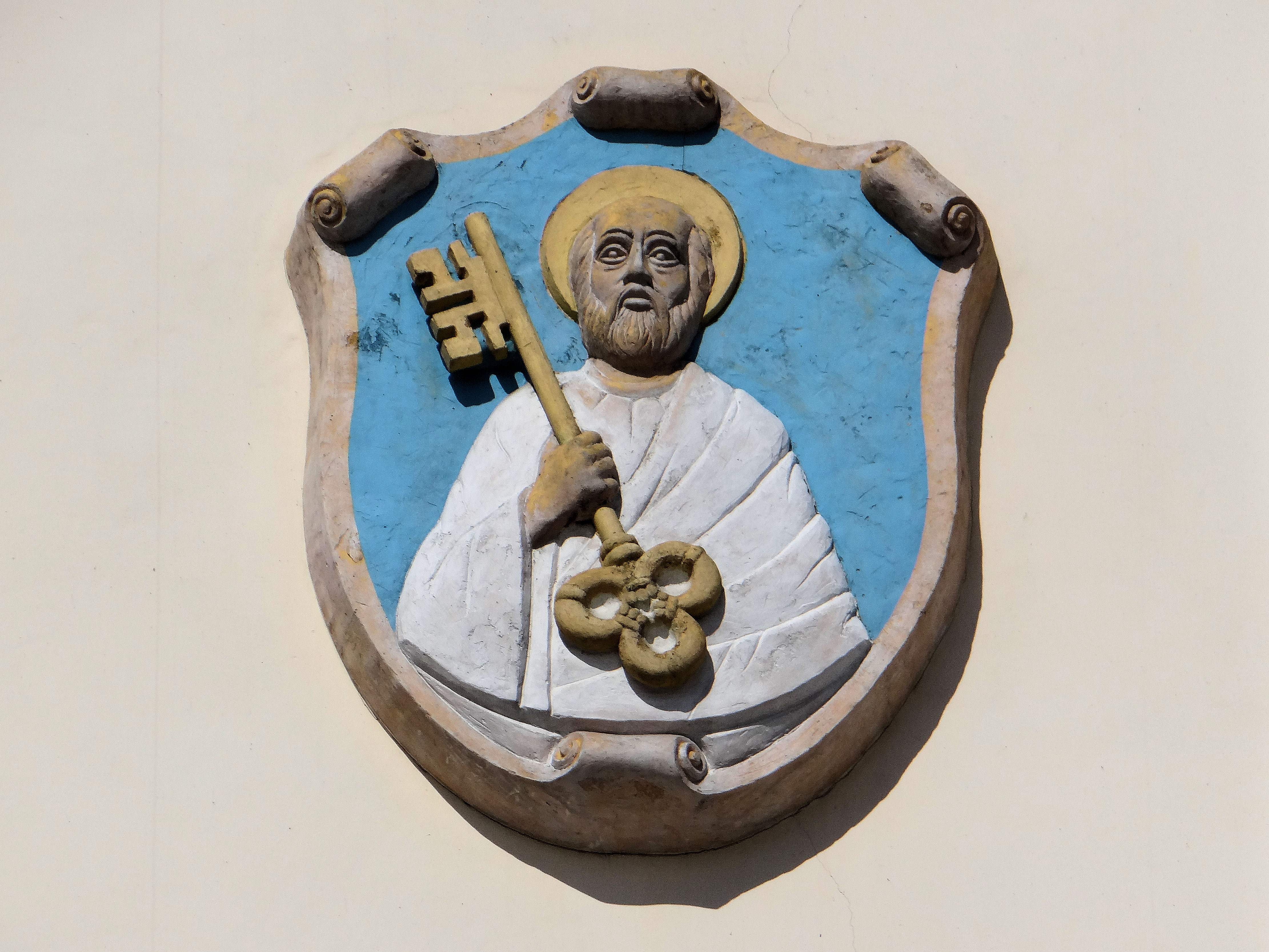 Ciechanów, ratusz, 1843-1845 - herb Ciechanowa z wieży ratuszowej